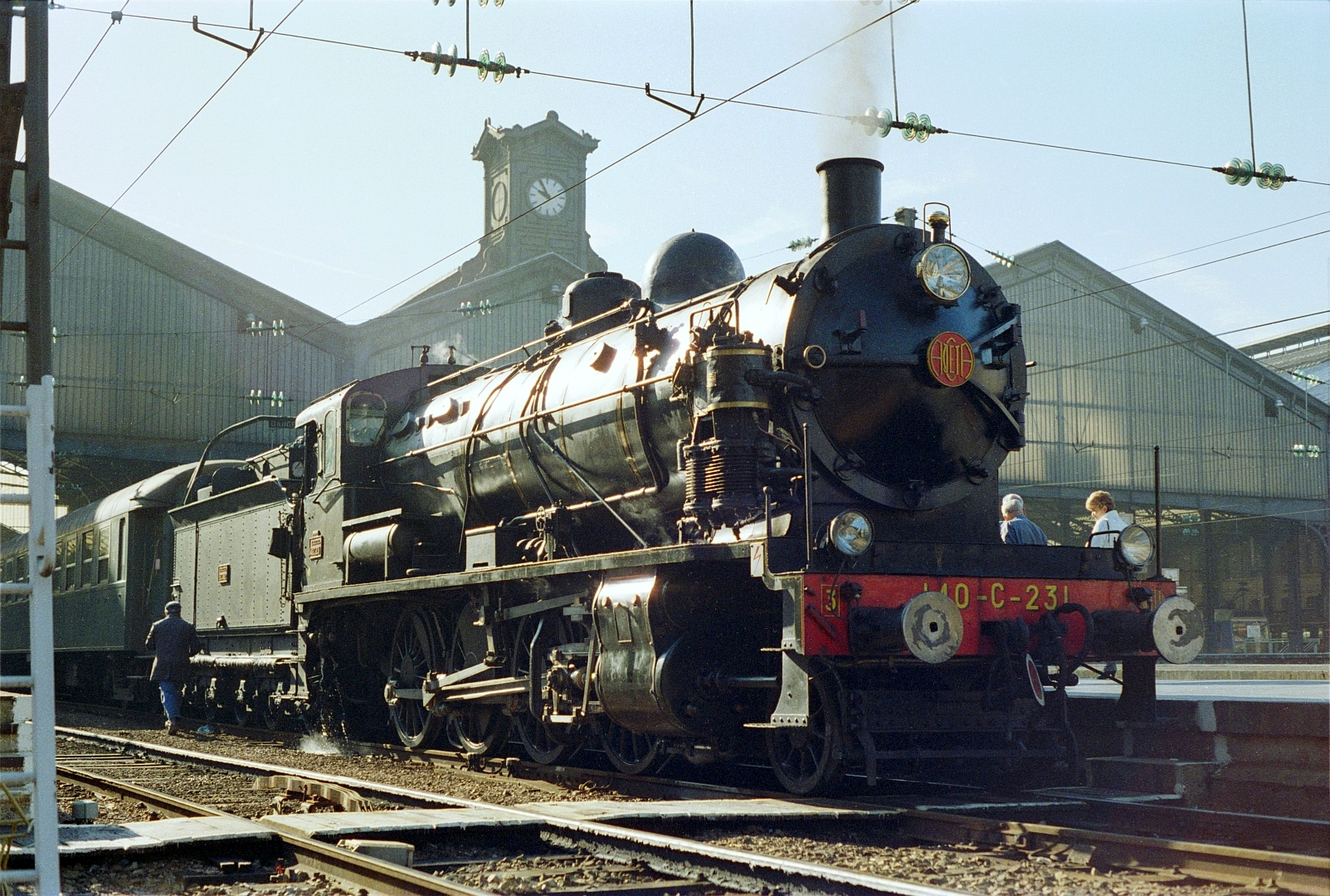 Un train spécial tracté par la 140 C 231, attend le départ en gare de Paris-Saint-Lazare le 18 octobre 1987.